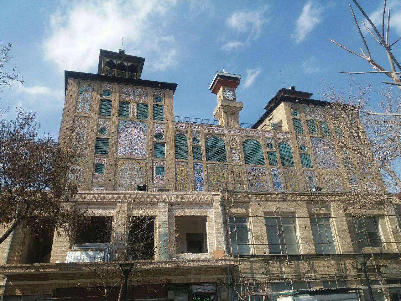 نمایی از بنای شمس العماره در خیابان ناصرخسرو، تهران